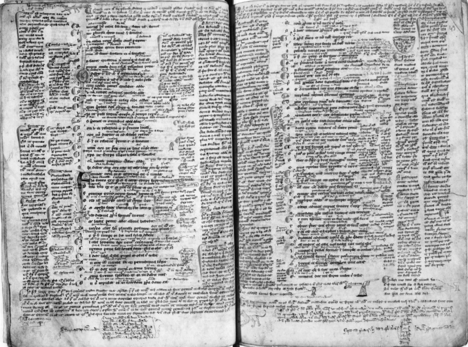 scansione in bianco e nero dal sito Gallica.fr per la consultazione dei manoscritti